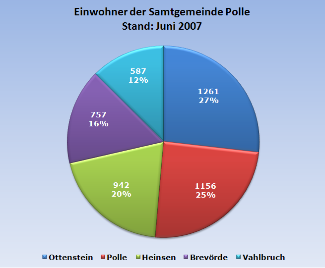 Bevölkerungstatistik: Einwohnerstand der Mitgliedsgemeinden der Samtgemeinde Polle zum 30. Juni 2007 nach Datenstand des Niedersächsischen Landesamtes für Statistik (NLS).